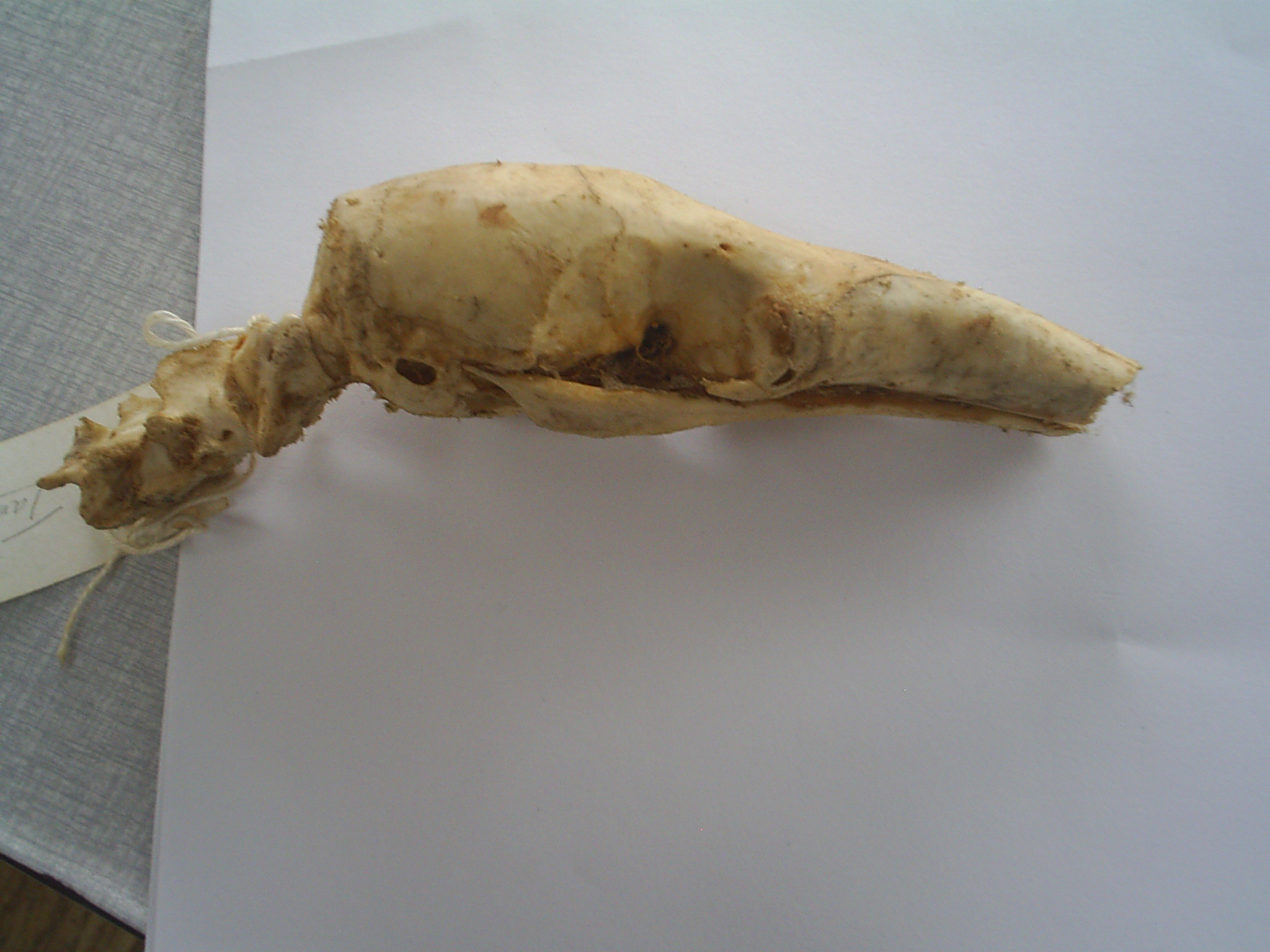 Cráneo de T. tetrodactyla